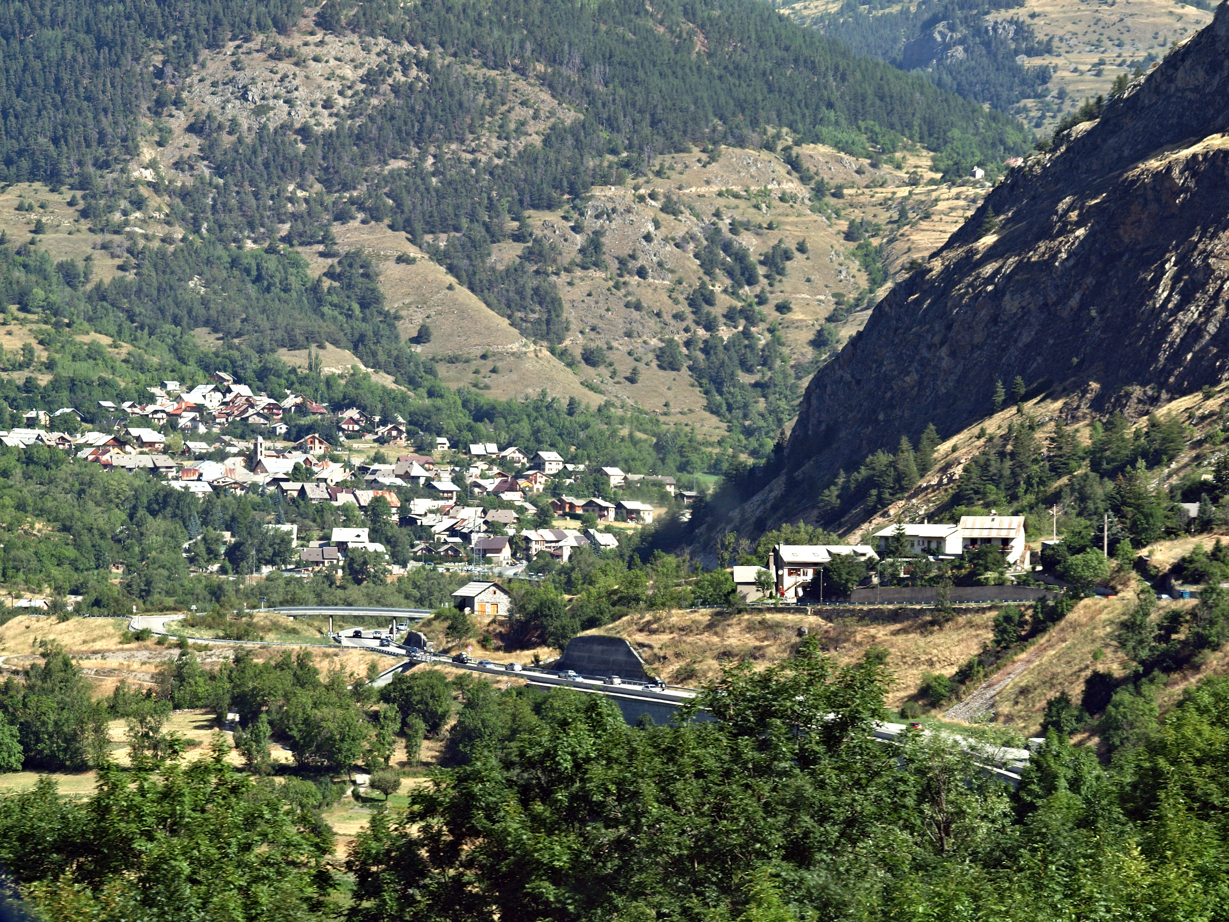 Saint-Martin-de-Queyrières, Hautes-Alpes (France) - Vu du hameau de Prelles depuis la route nationale 94